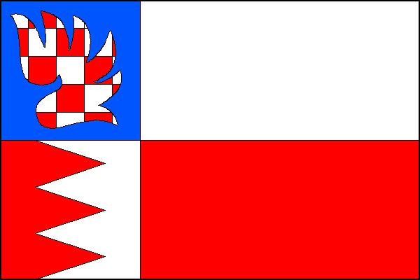 Vlajka obce Chotiměř